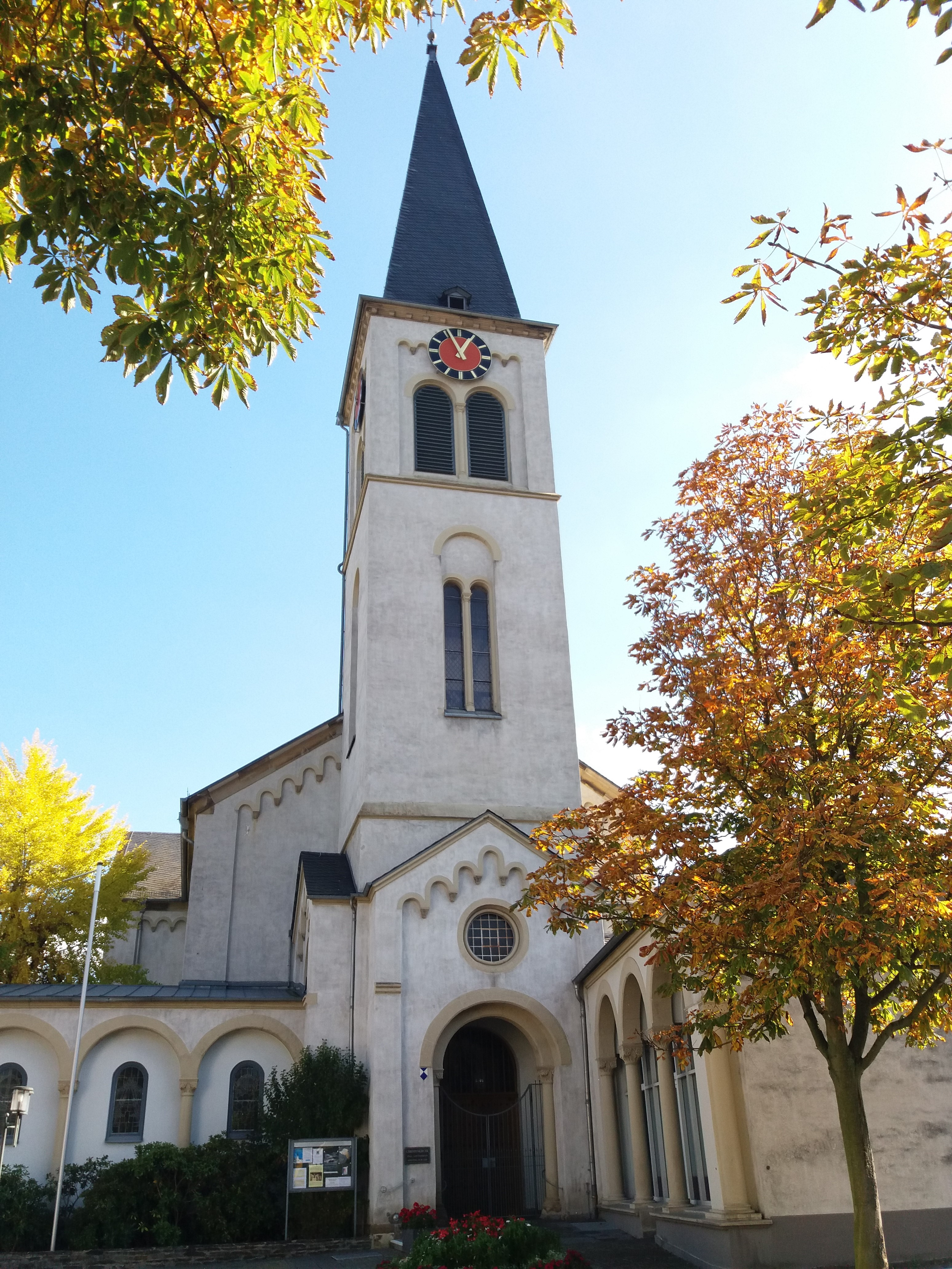 Christuskirche Boppard West-Ansicht